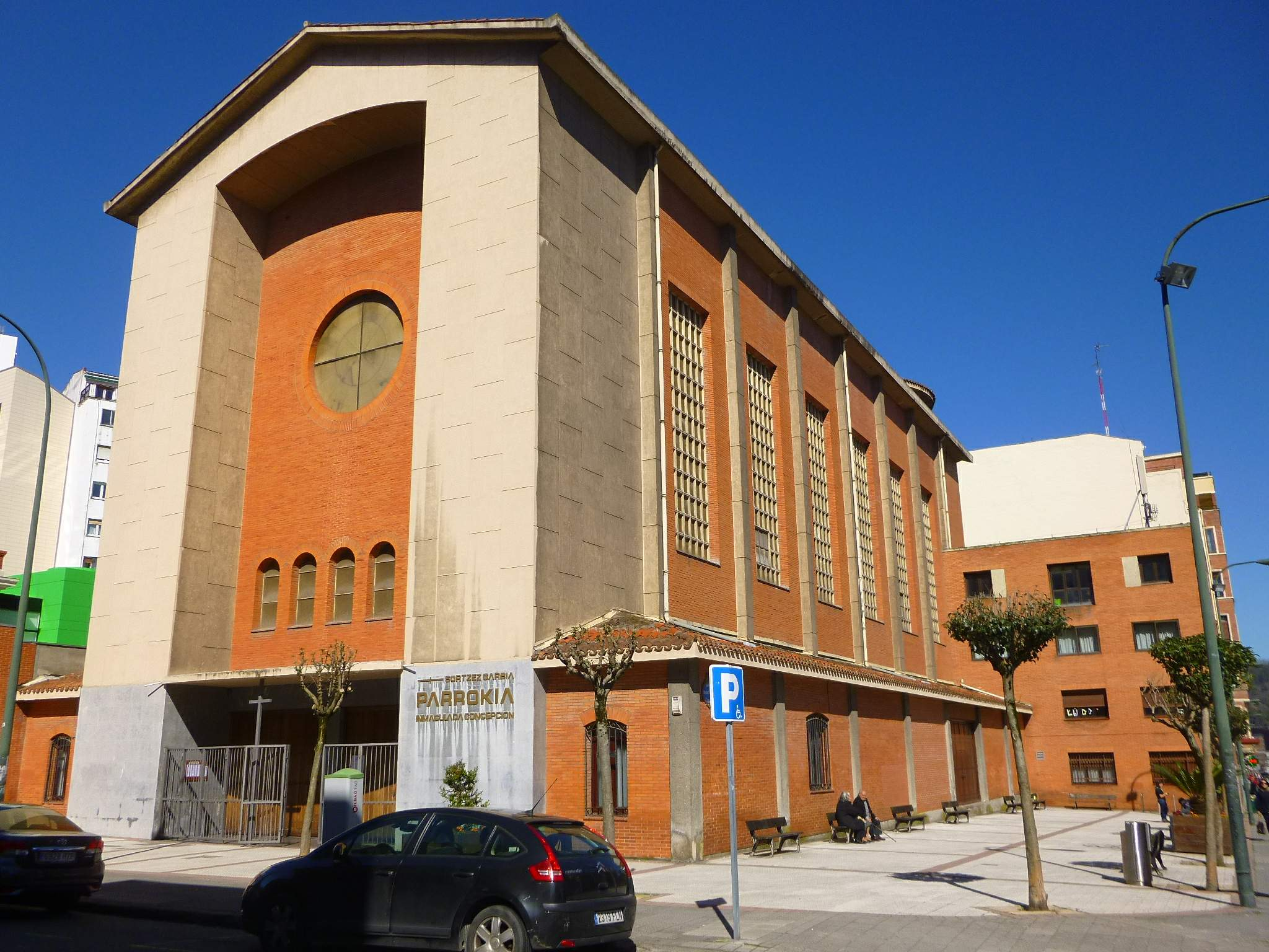 Iglesia de la Inmaculada Concepción (Bilbao)